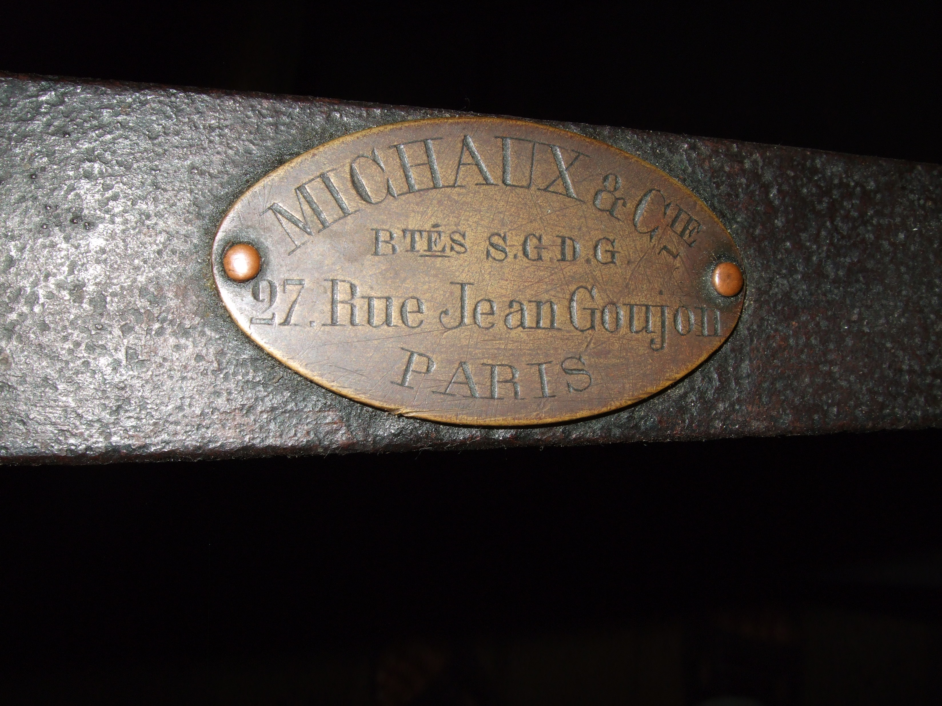 Badge on Michaux velocipede